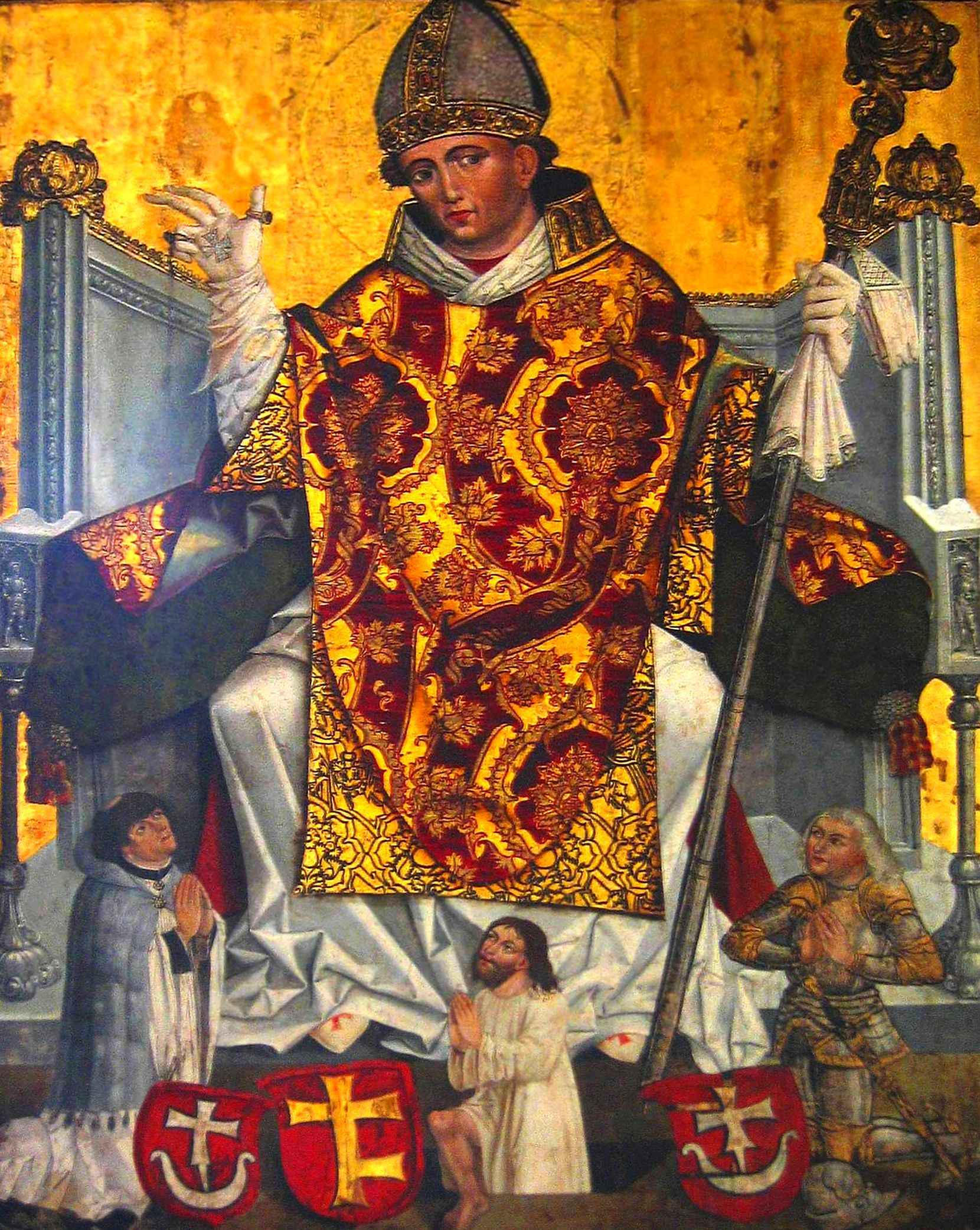 Saint Stanisław of Kraków on the painting from XVI century image taken by user:Mathiasrex Maciej Szczepańczyk